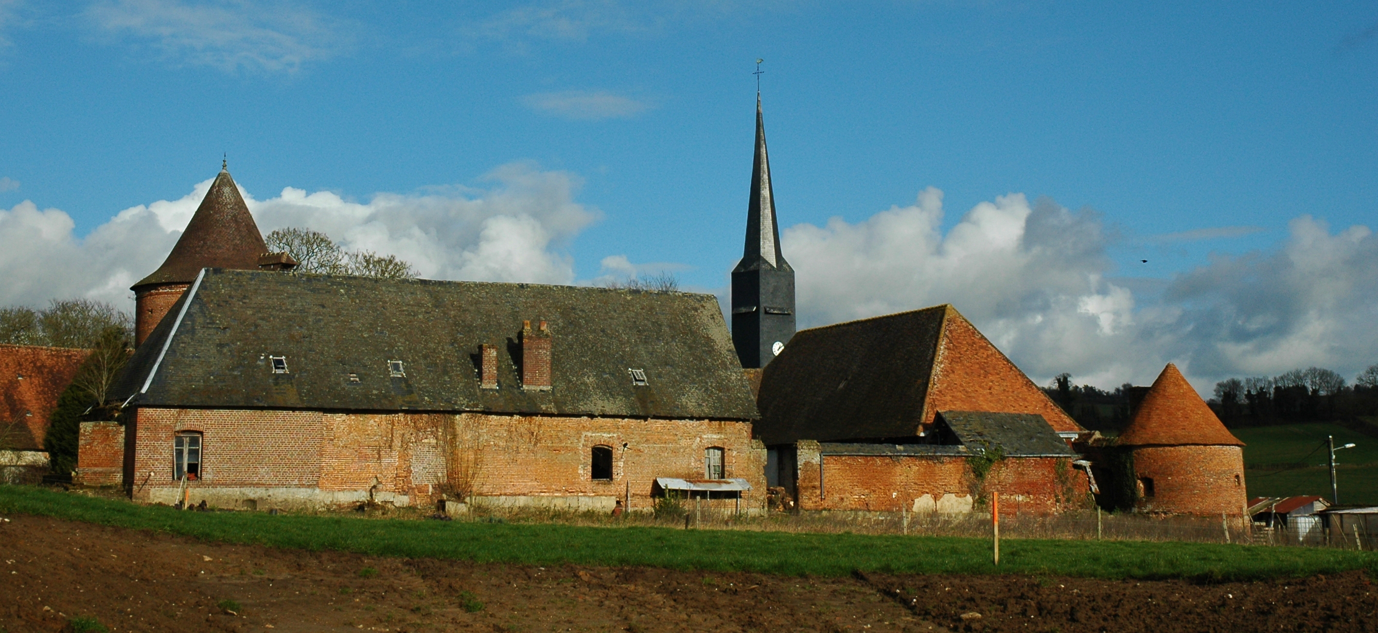 Bouelles (Seine-Maritime, France). Le château.